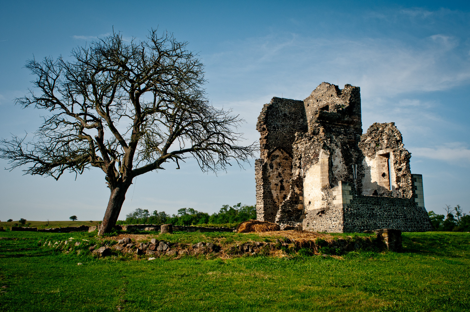 Templomrom (Taliándörögd, Magyar dűlő) This is a photo of a monument in Hungary, Identifier: 10448